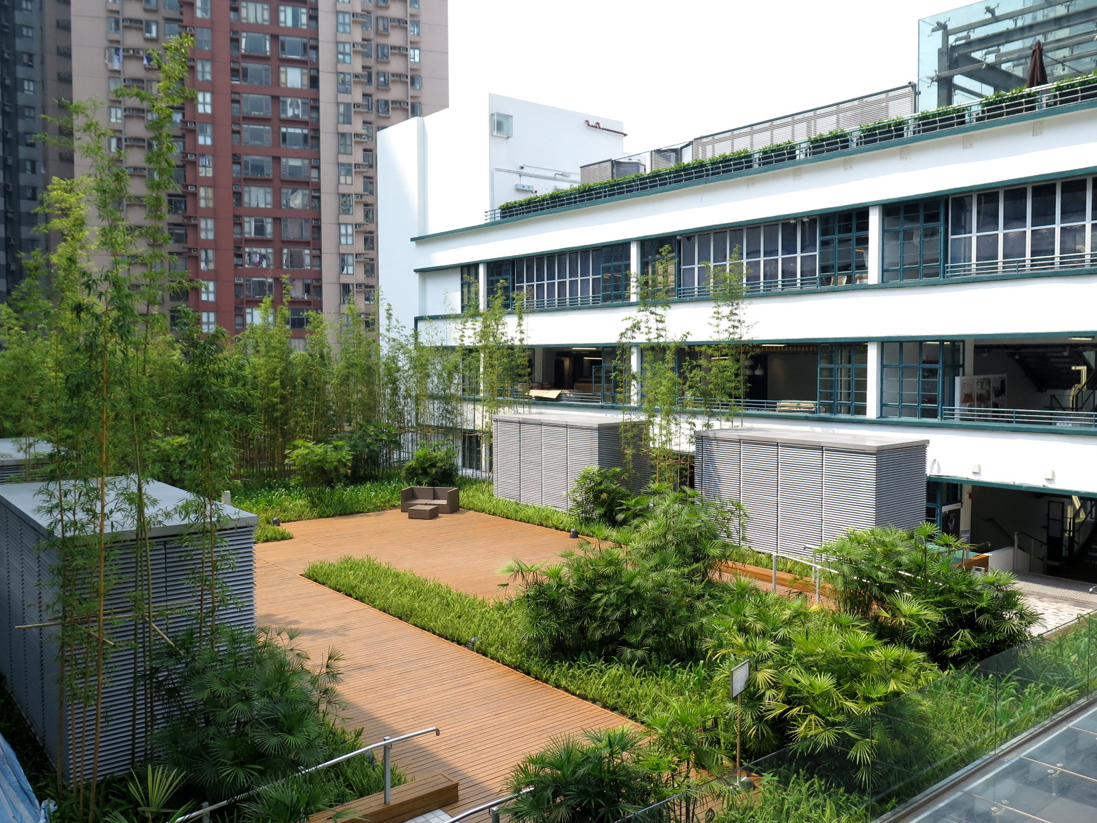 PMQ Plateau Garden